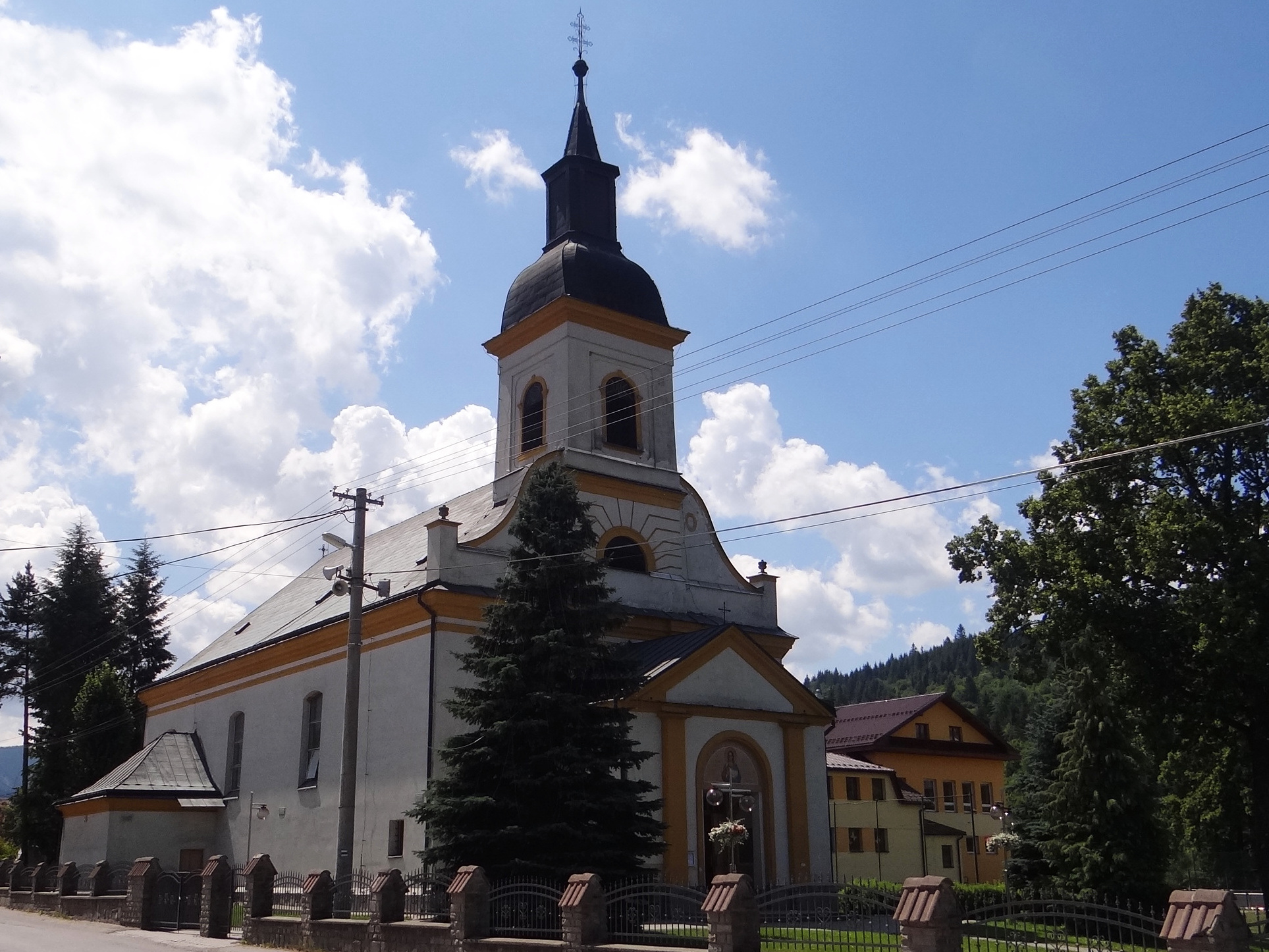 Habovka kostol (kościół grecko-katolicki w Habovce)